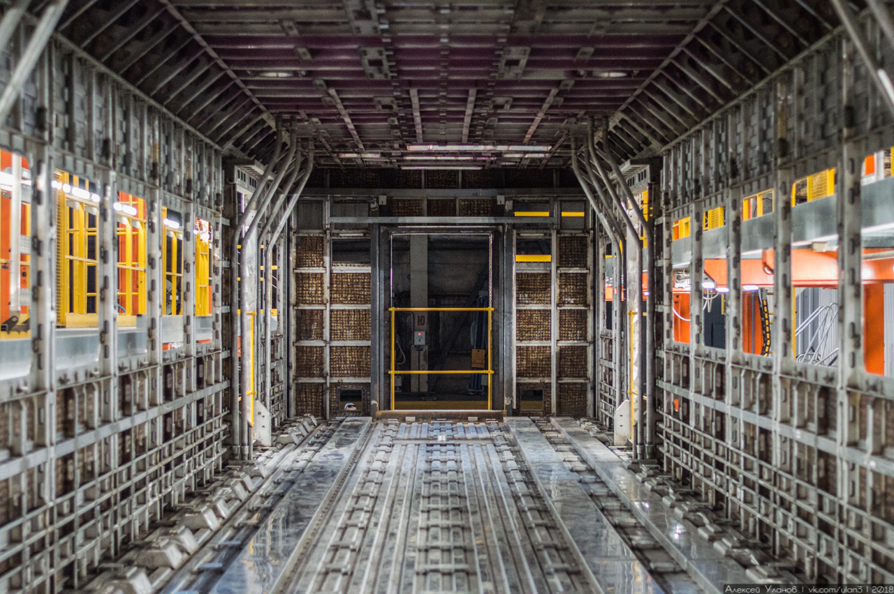 Каркас вагона электропоезда ЭГ2Тв-009